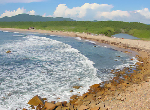 Panorámica de playa Peñitas